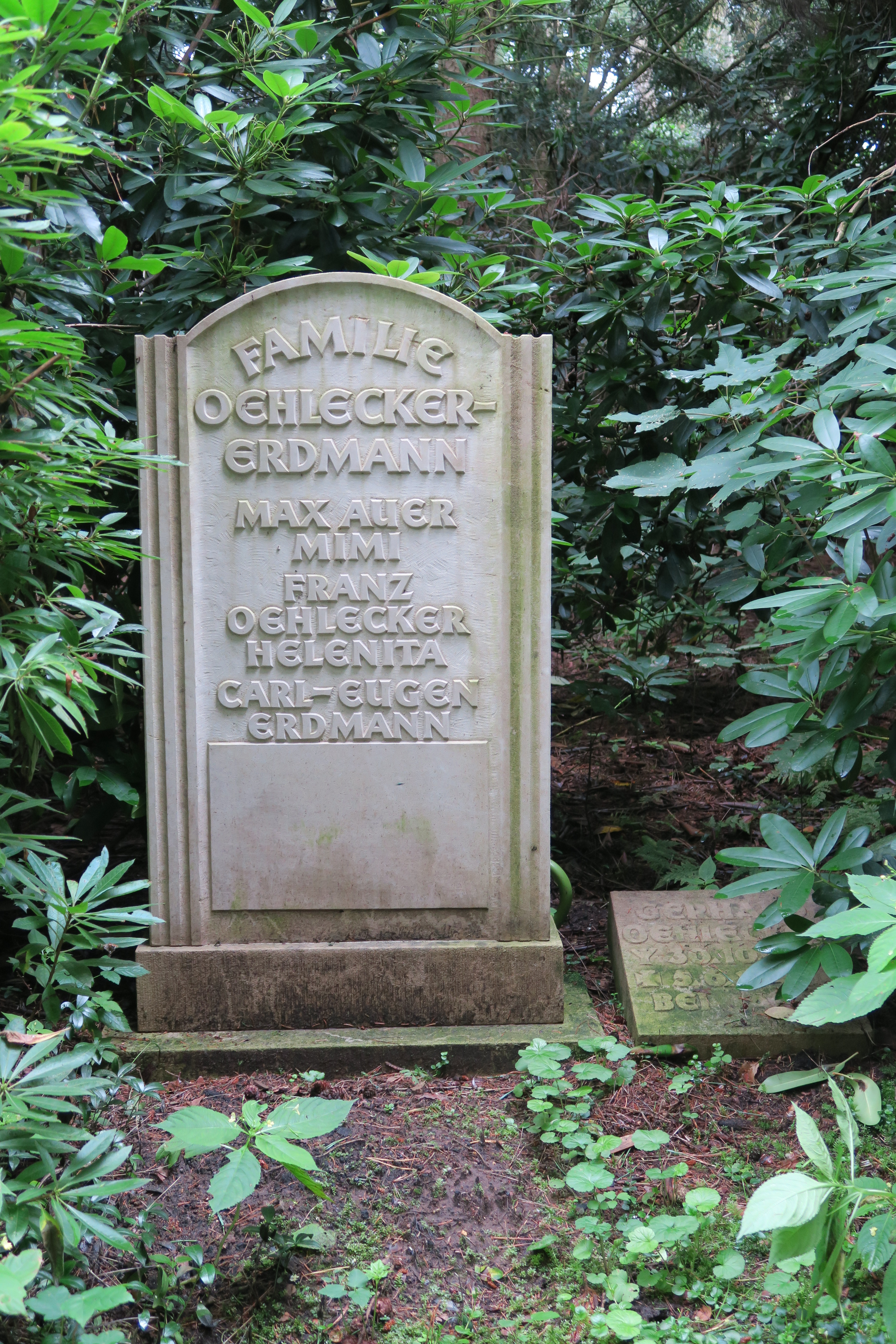 Grabstein Familie Oehlecker-Erdmann (u.a. mit Franz Oehlecker) auf dem Ohlsdorfer Friedhof, Hamburg